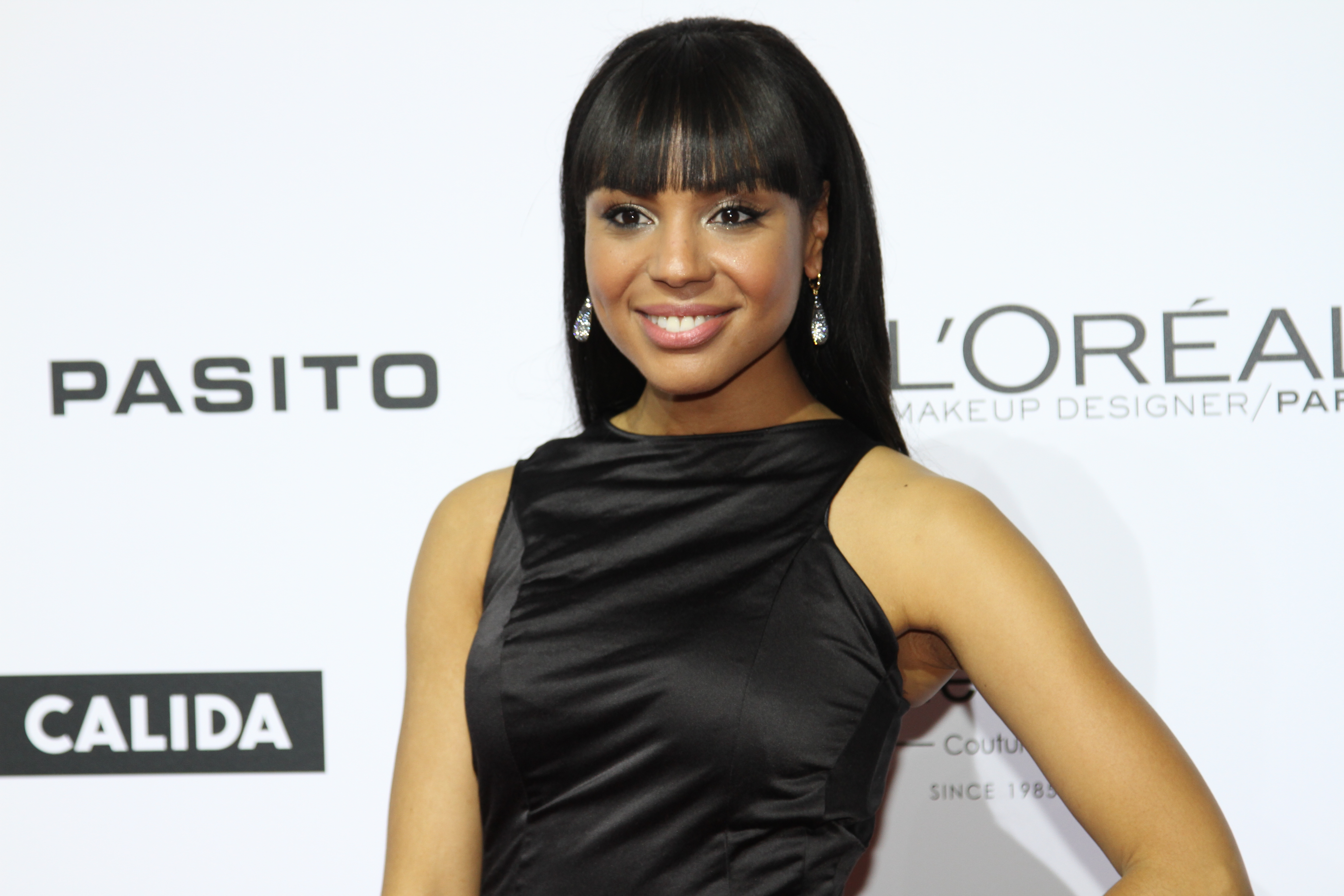 Moderatiorin Alexandra Maurer an der Miss Schweiz Wahl 2015